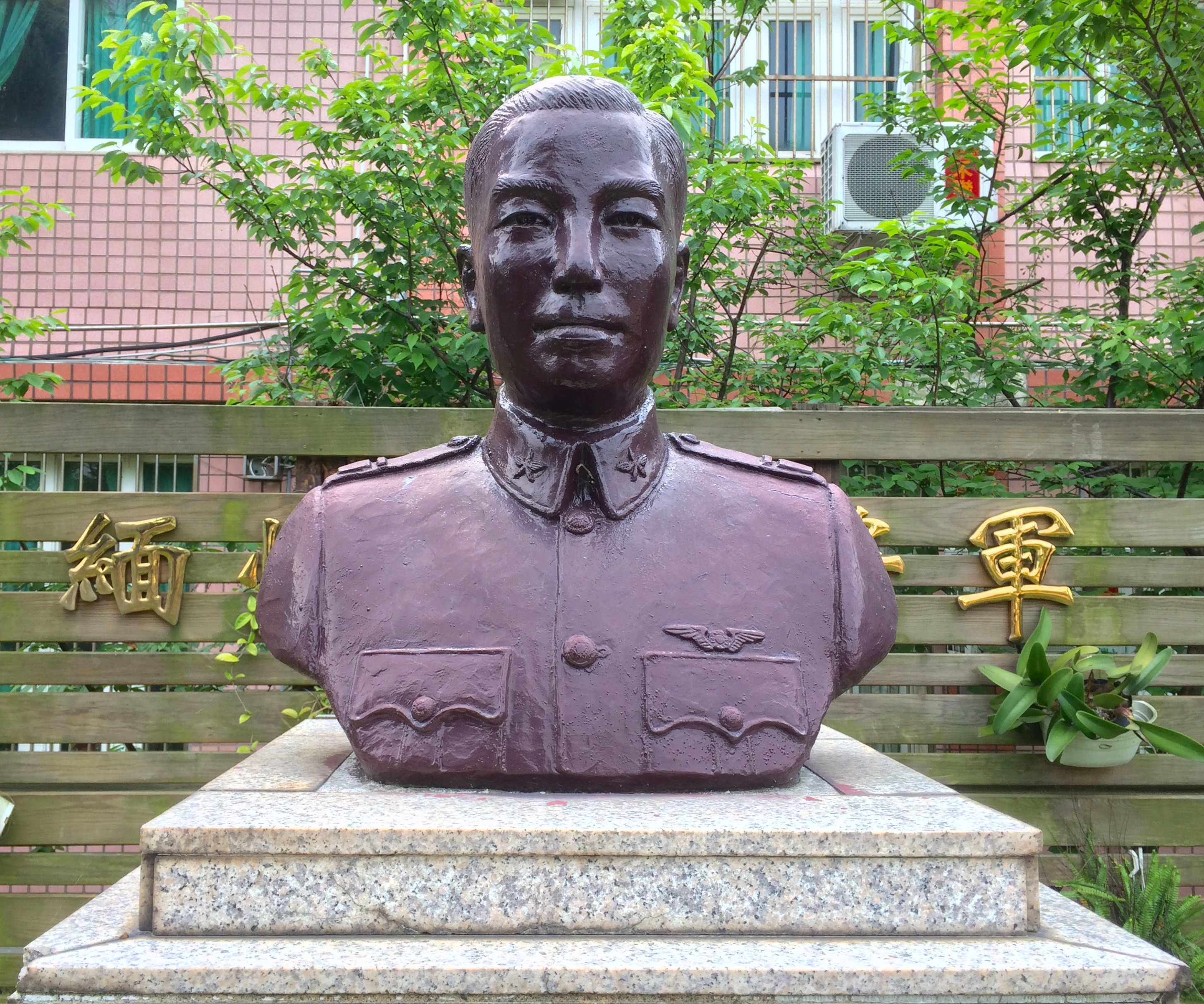 陳康的銅像